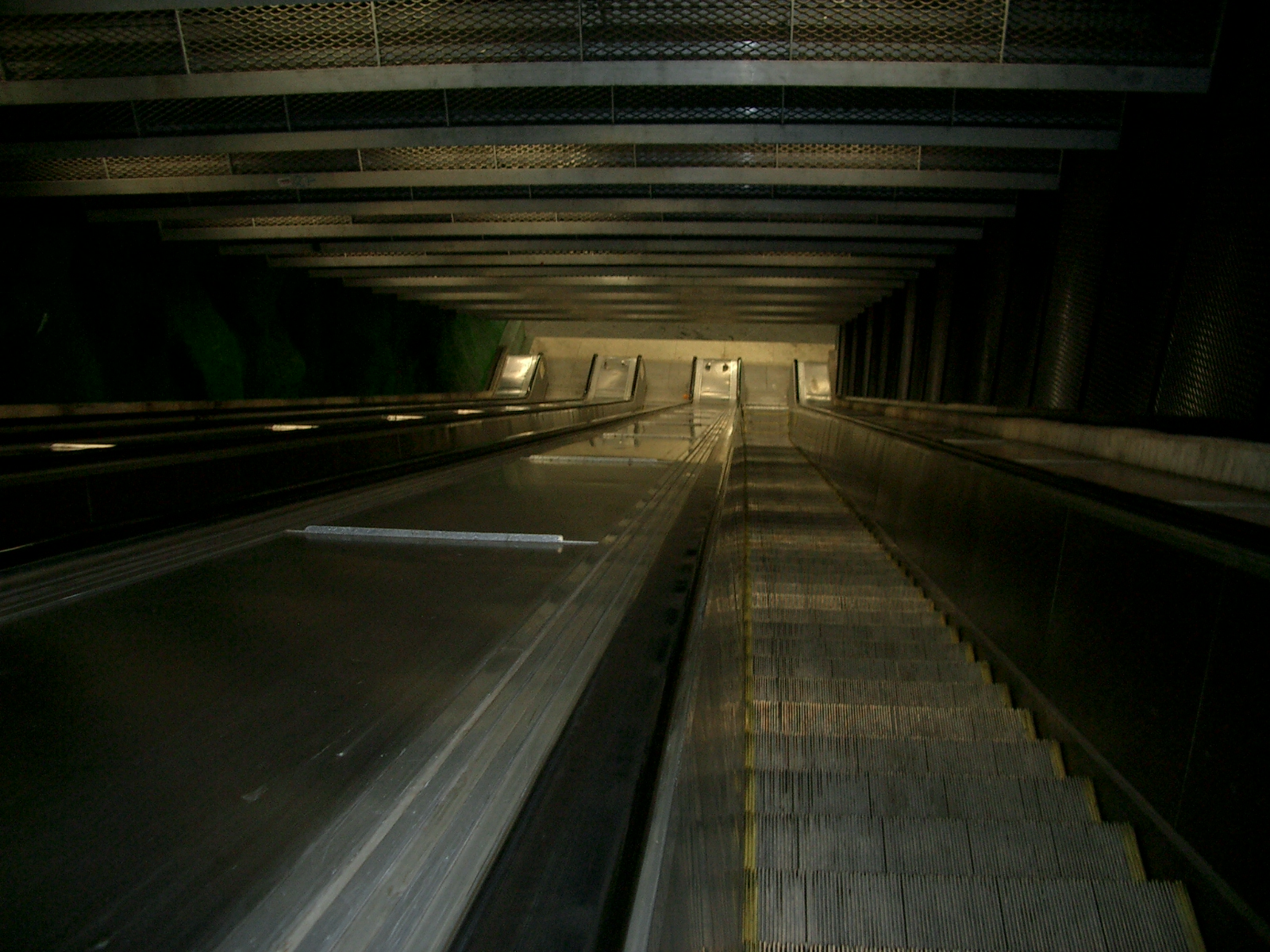 Escalator in Alby, Stockholm.